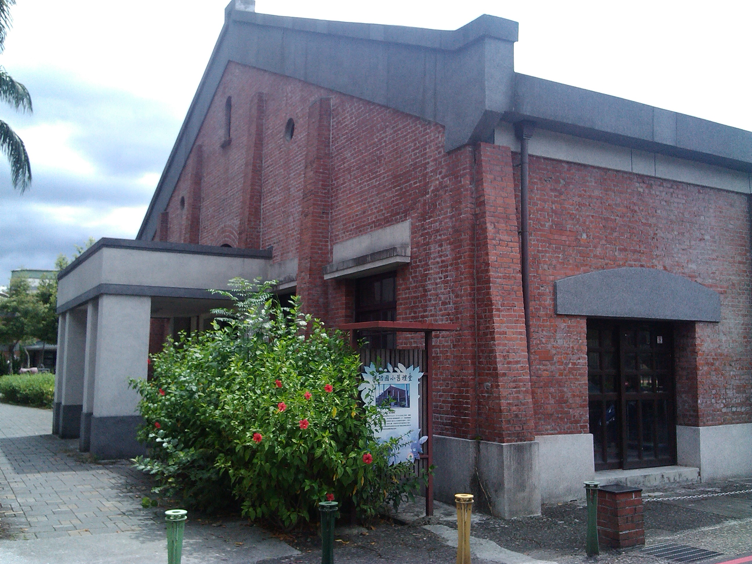 同上